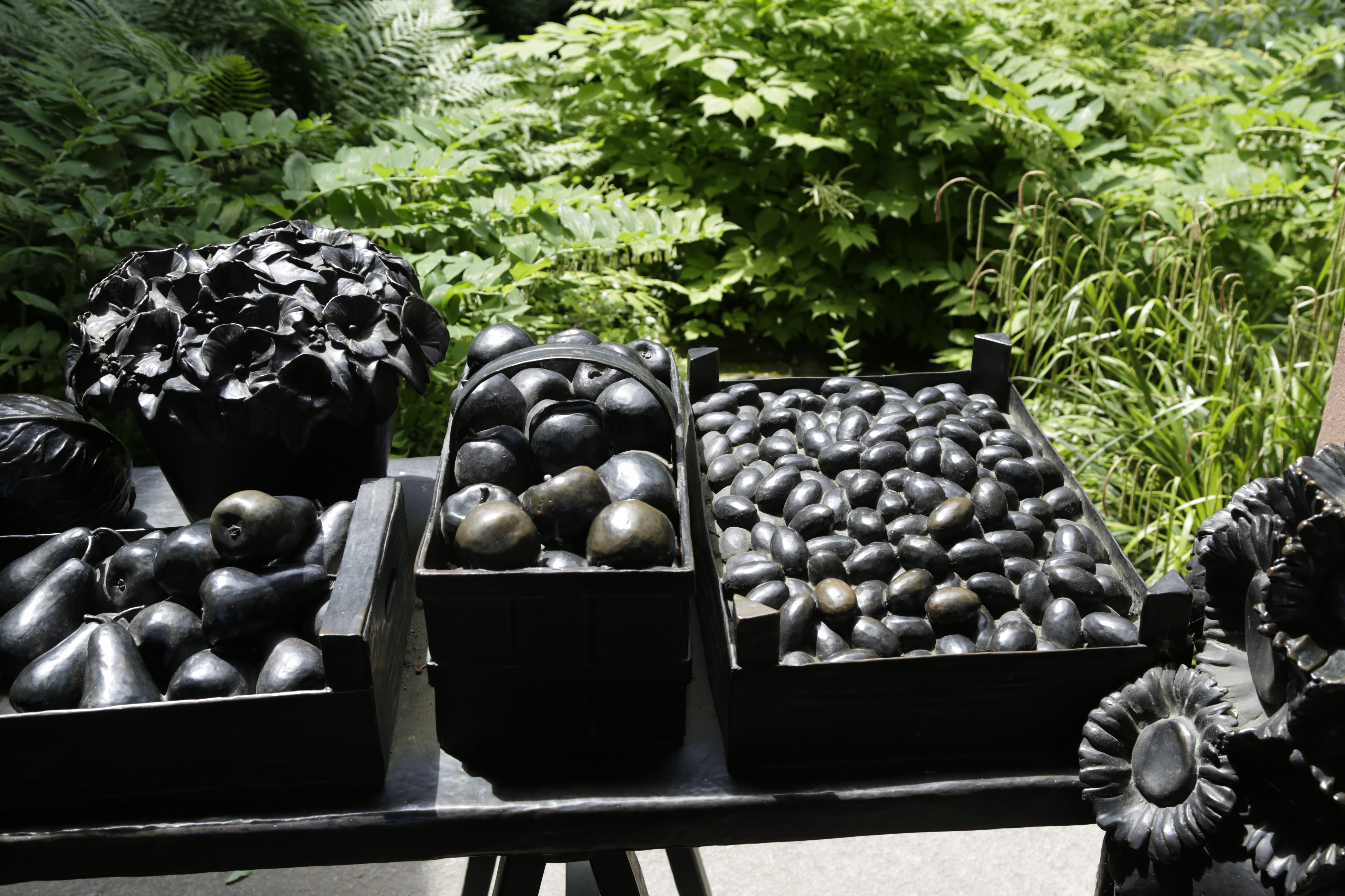 Die Markttische im Kreuzgang des Basler Müsters, sind eine Arbeit von Bettina Eichin.